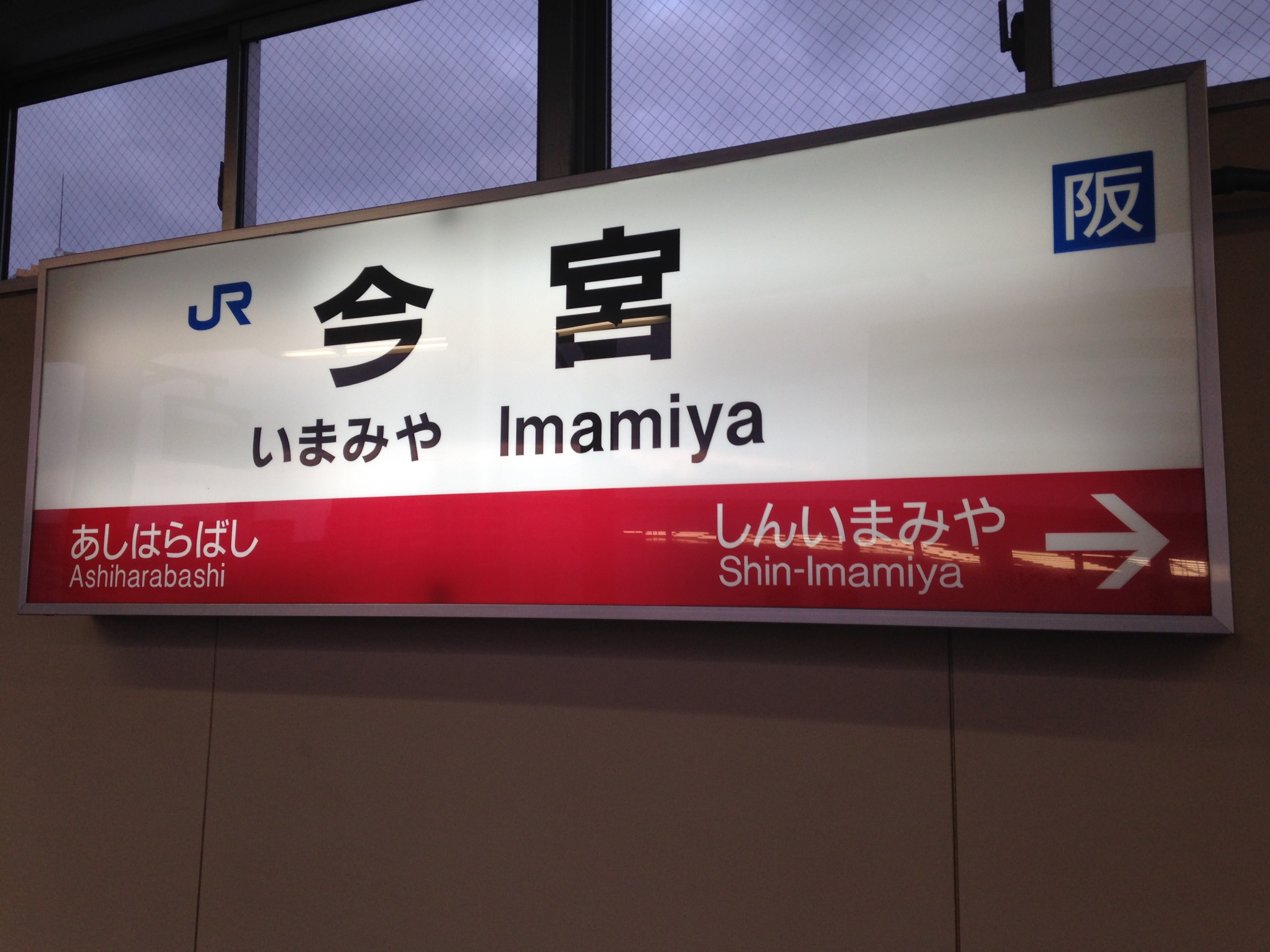 今宮駅の駅名標(大阪環状線)